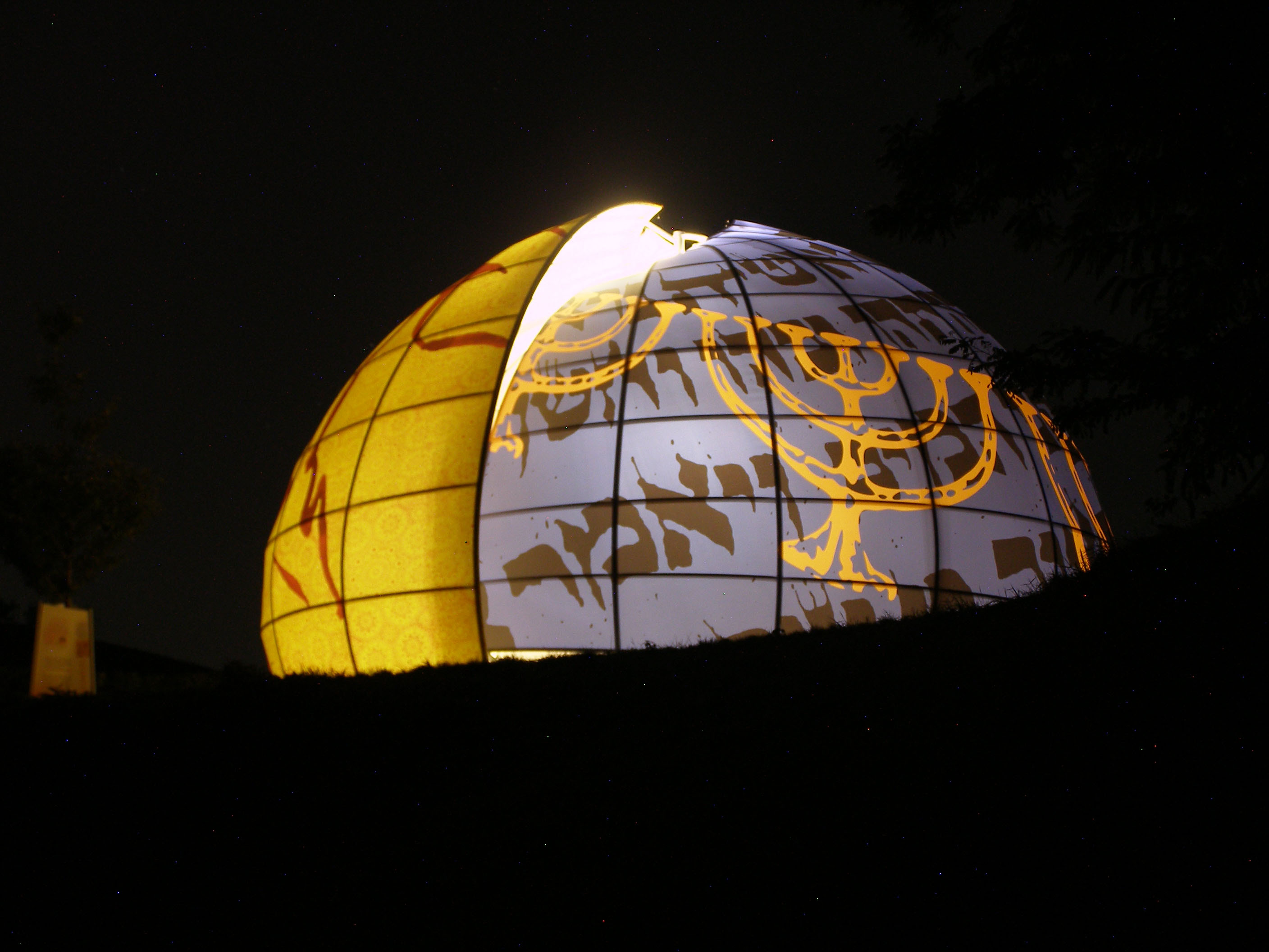 Zelt der Religionen auf der Landesgartenschau 2012, jüdische Seite